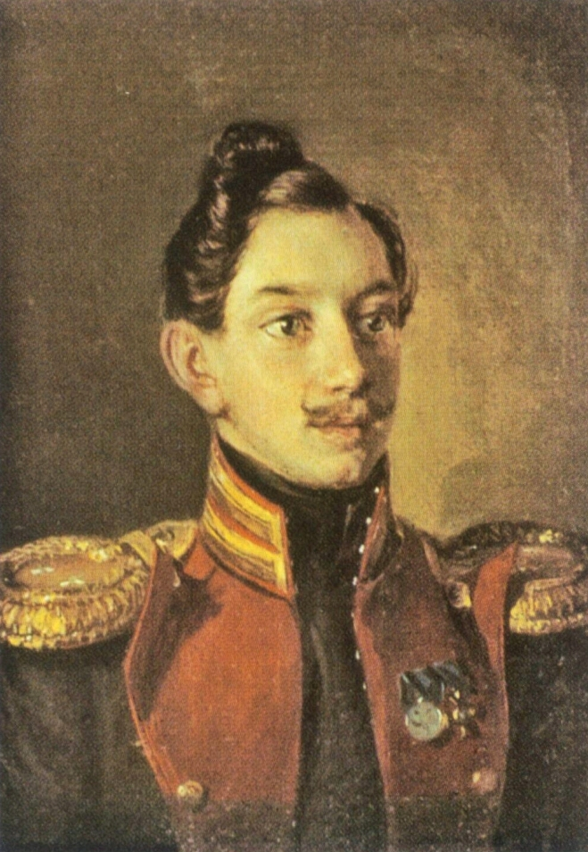 Портрет Романа Алексеевича Томилова (1812 - 1864), подпрапорщика лейб-гвардии Московского полка. Изображён с медалью "За взятие Варшавы" и орденом "Virtuti militari" 4-й степени.